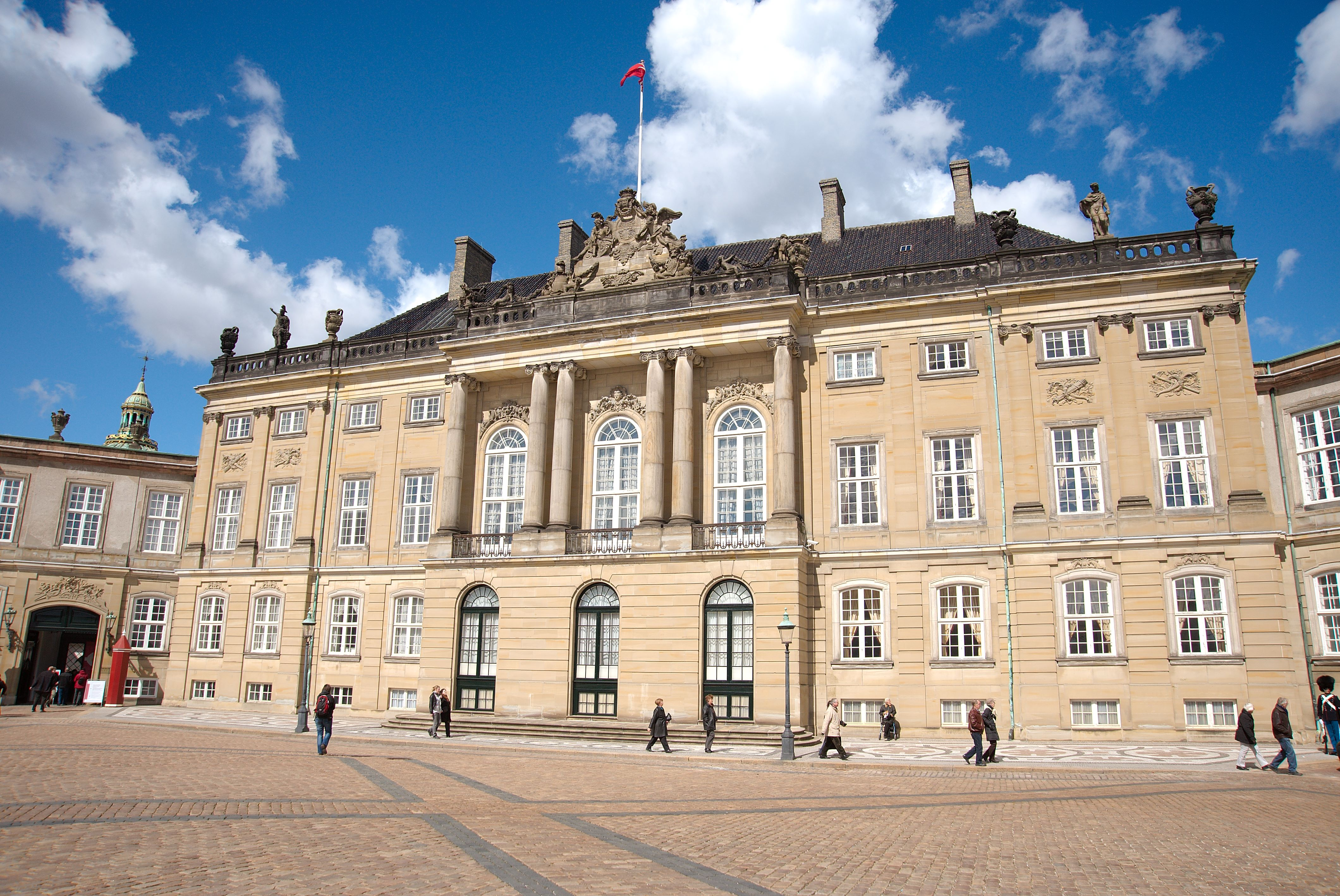 Amalienborg